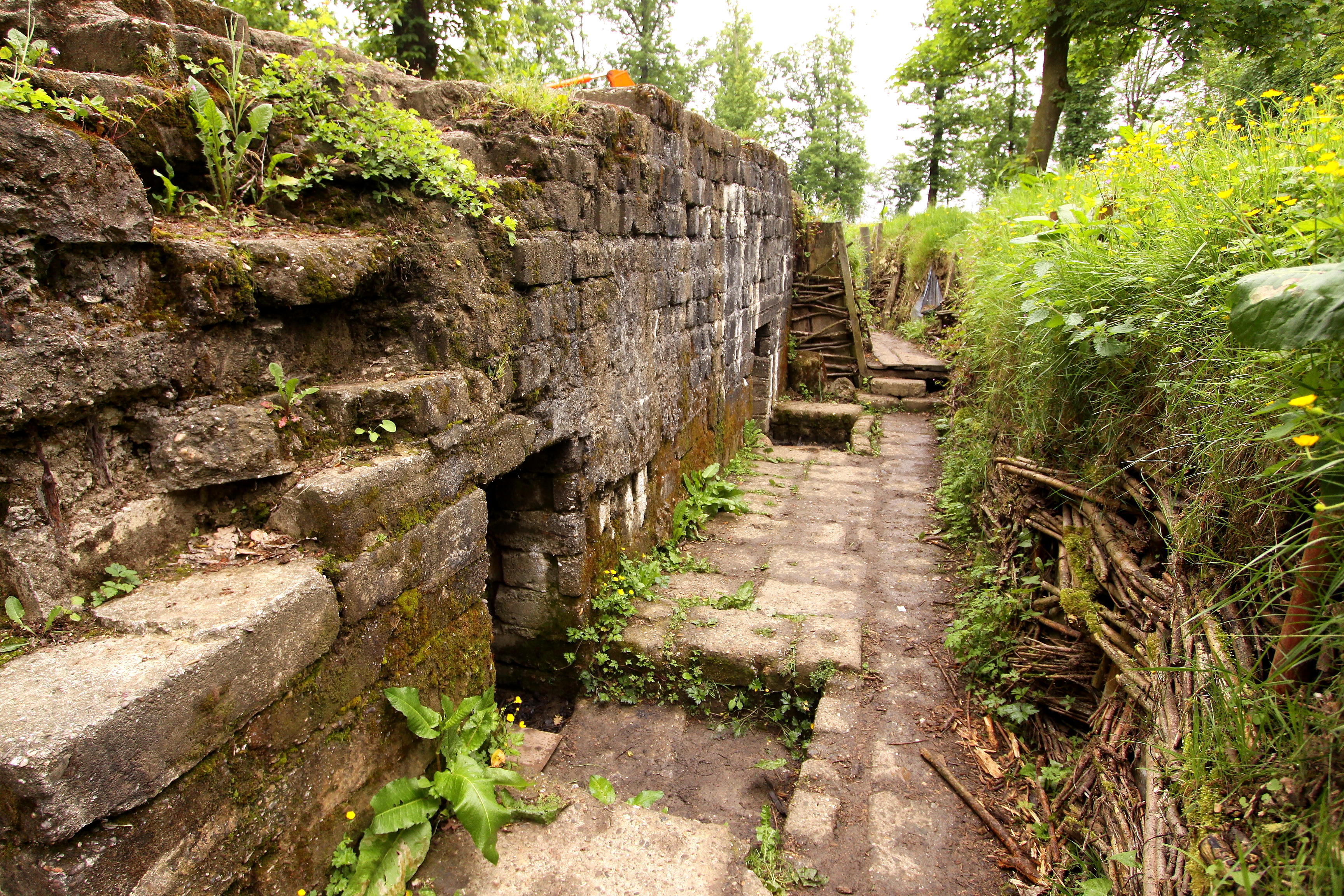 Bayernwald